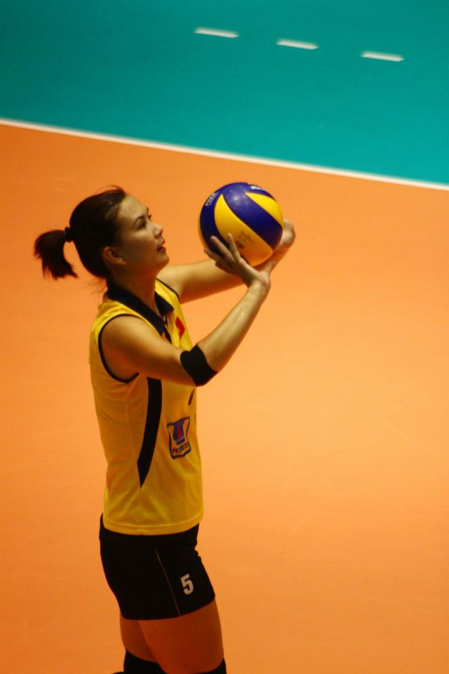 Trên sân bóng